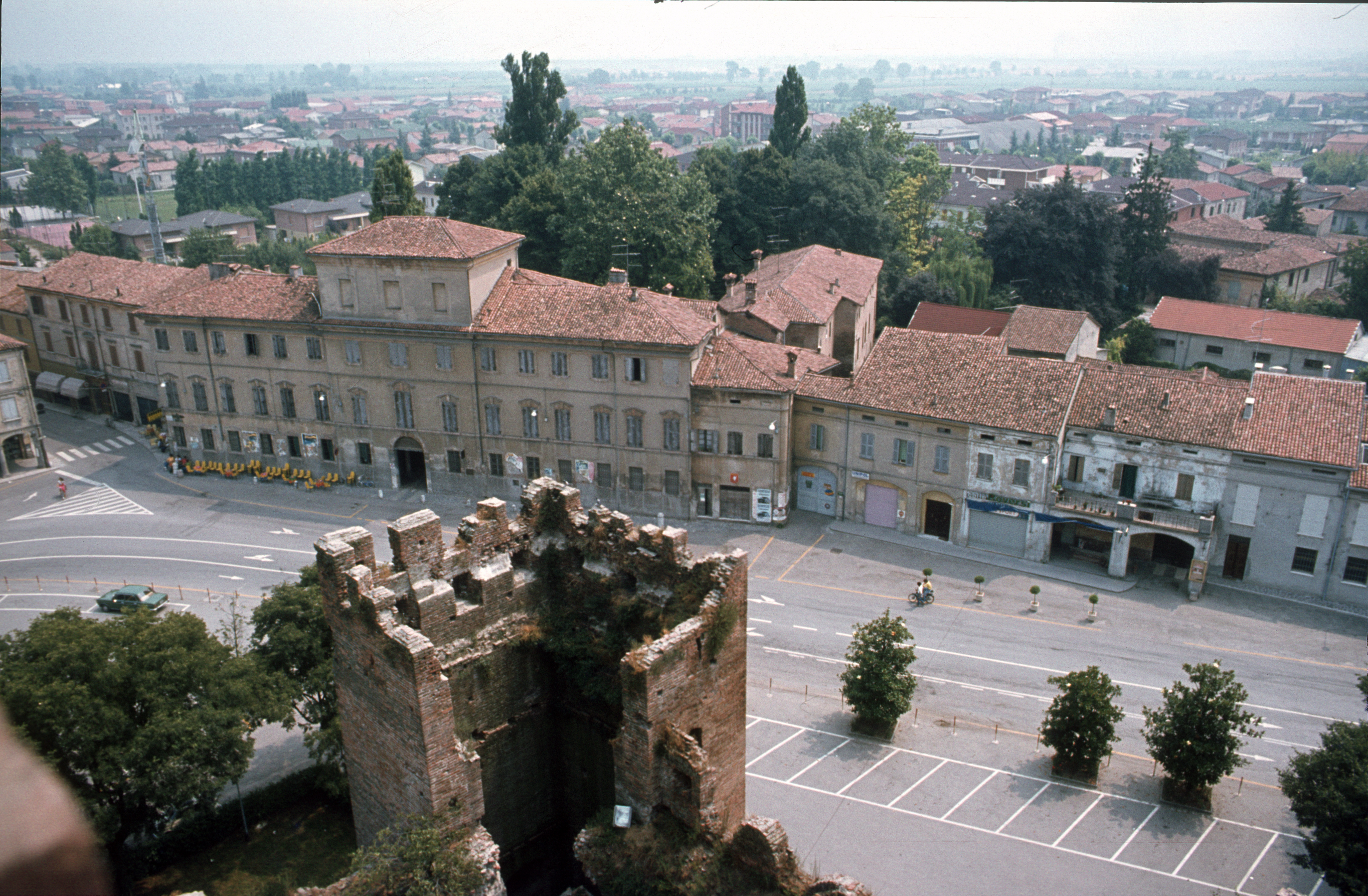 Rocca medievale e mastio This is a photo of a monument which is part of cultural heritage of Italy.